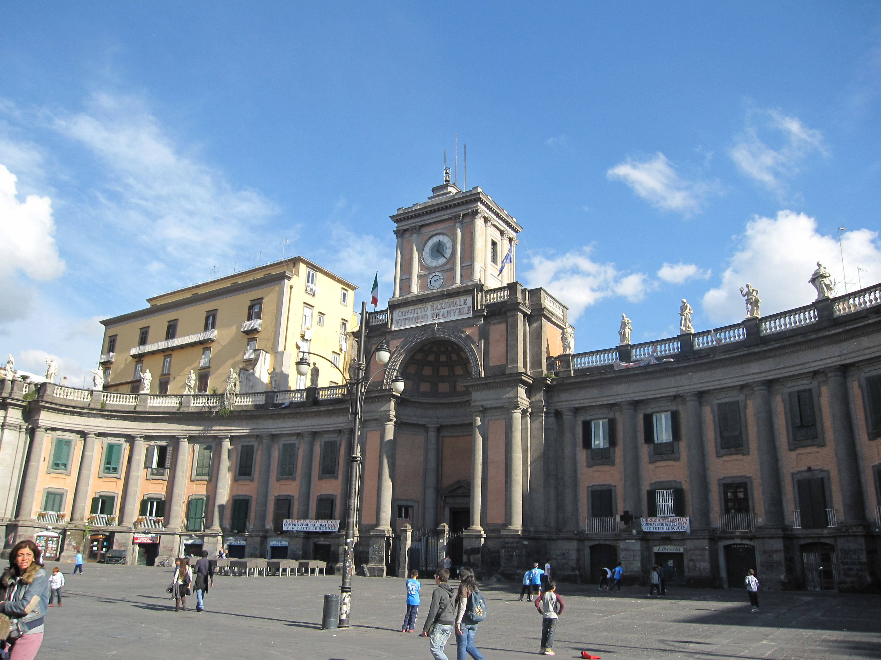 Il Foro Carlino di Luigi Vanvitelli, Napoli.